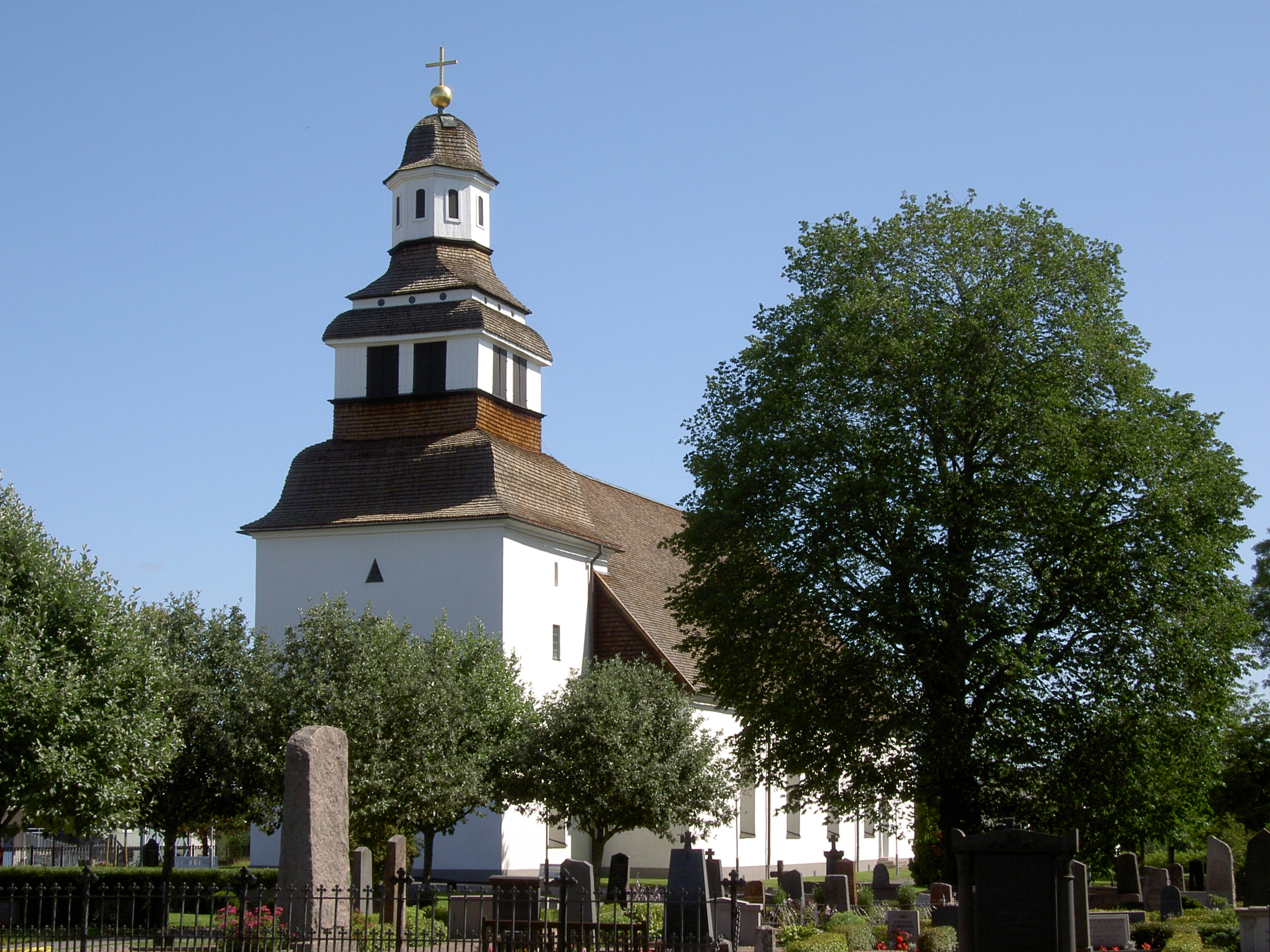 Södra Vi kyrka